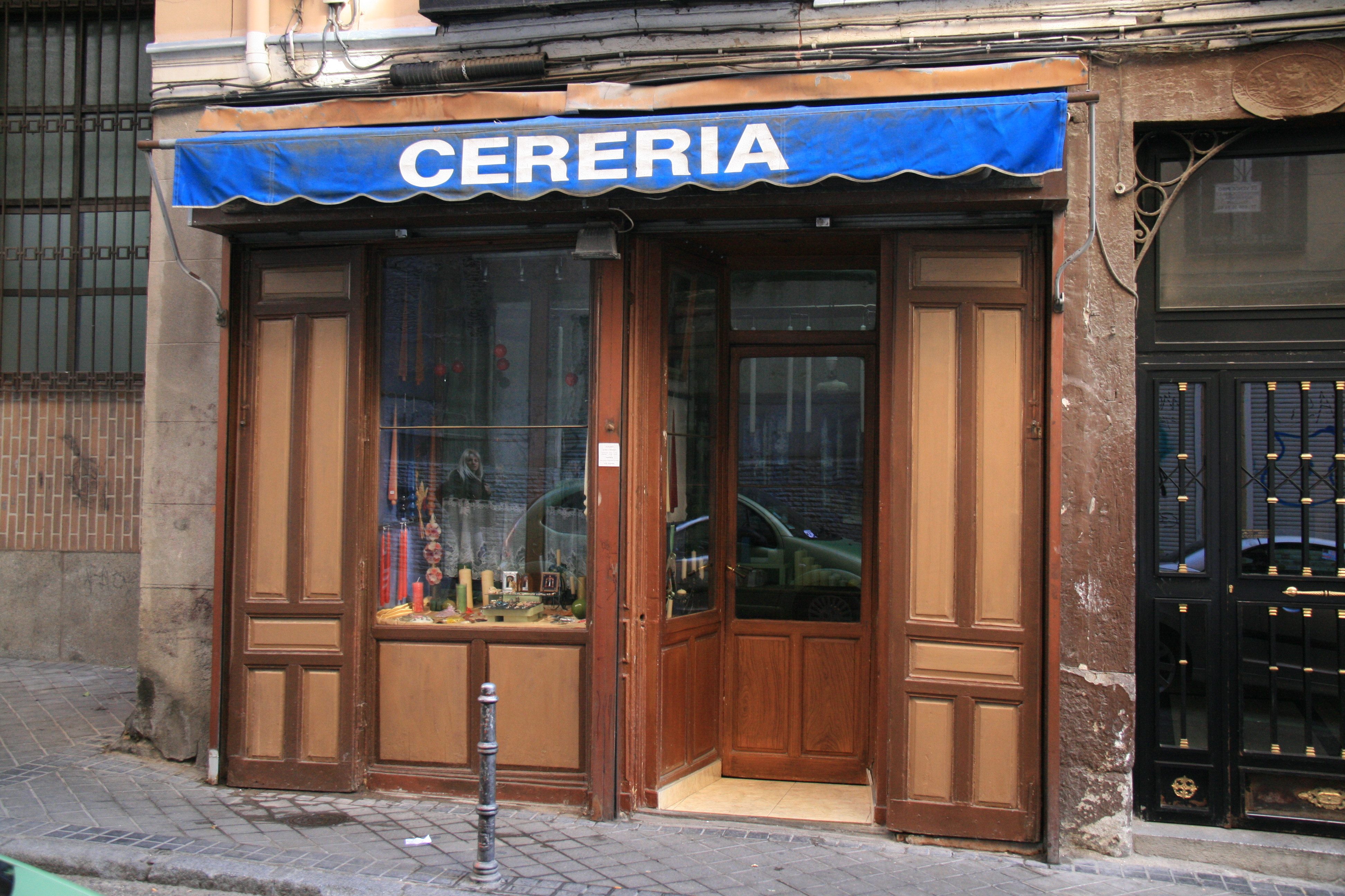 Cecería - Madrid